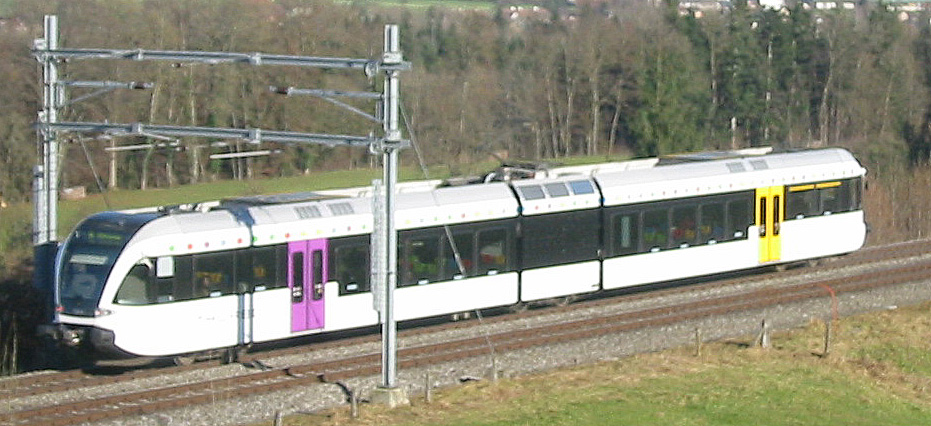 Stadler GTW der Thurbo auf der St. Galler S-Bahn (S1) zwischen Schwarzenbach und Algetshausen-Henau am 25.12.2004.